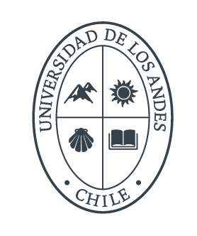 Logo de la Universidad de los Andes